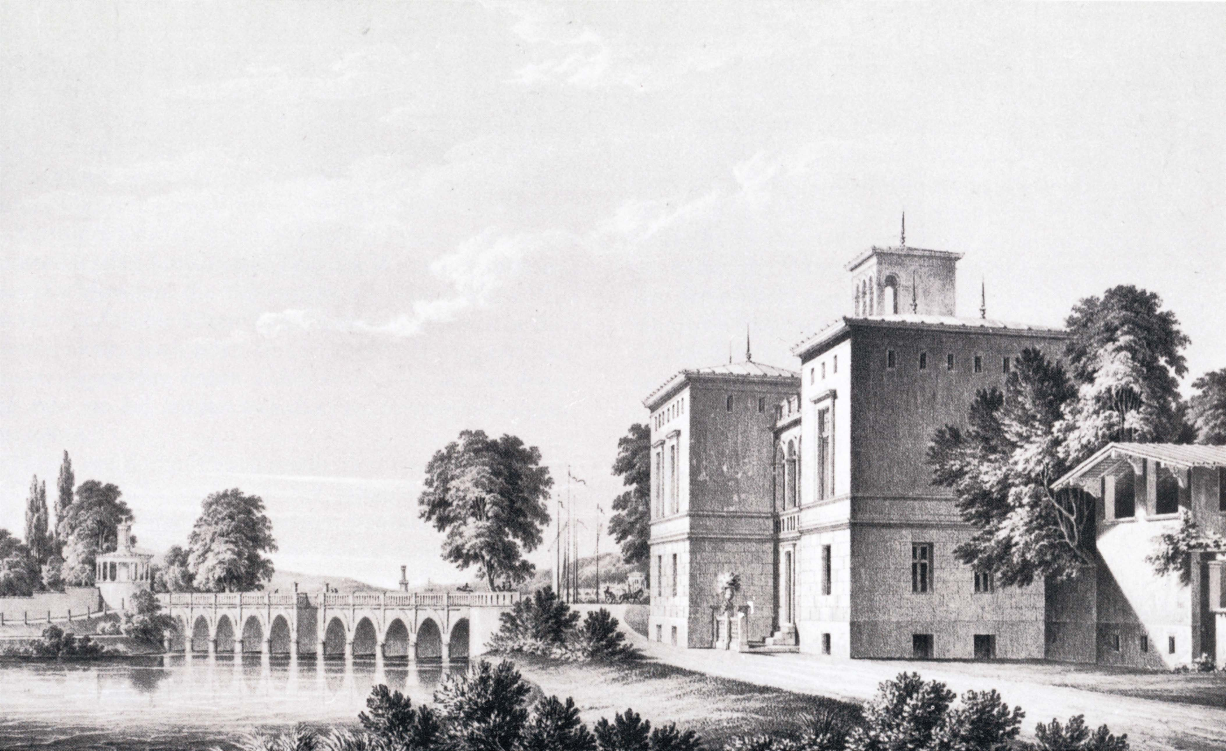 Villa Schöningen, Glienicker Brücke und Rotunde, Lithografie um 1845